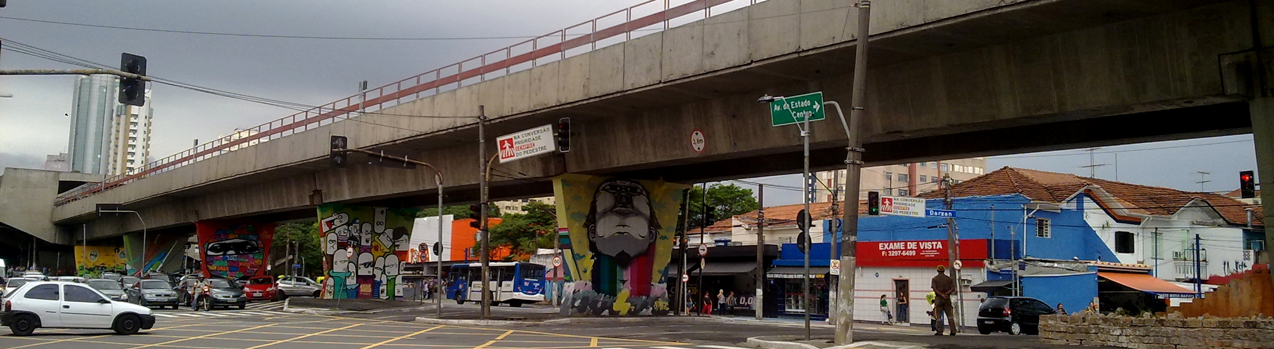 Museu Aberto de Arte Urbana de São Paulo, Santana, Zona Norte de São Paulo, Brasil.